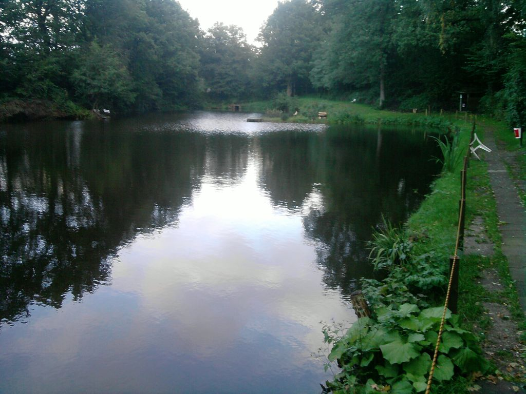 Forellensee-Holm aus der Sicht des Eingangs.